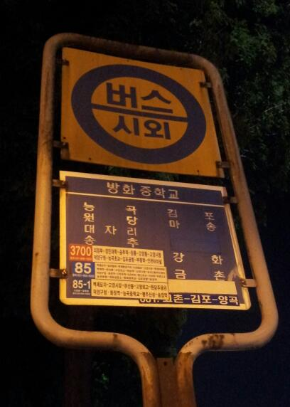 김포공항시외버스터미널(구)